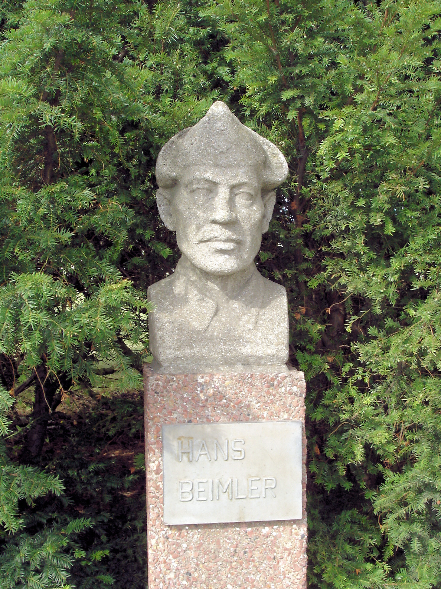 Gedenkbüste Hans Beimler in Rostock, Künstler unbekannt